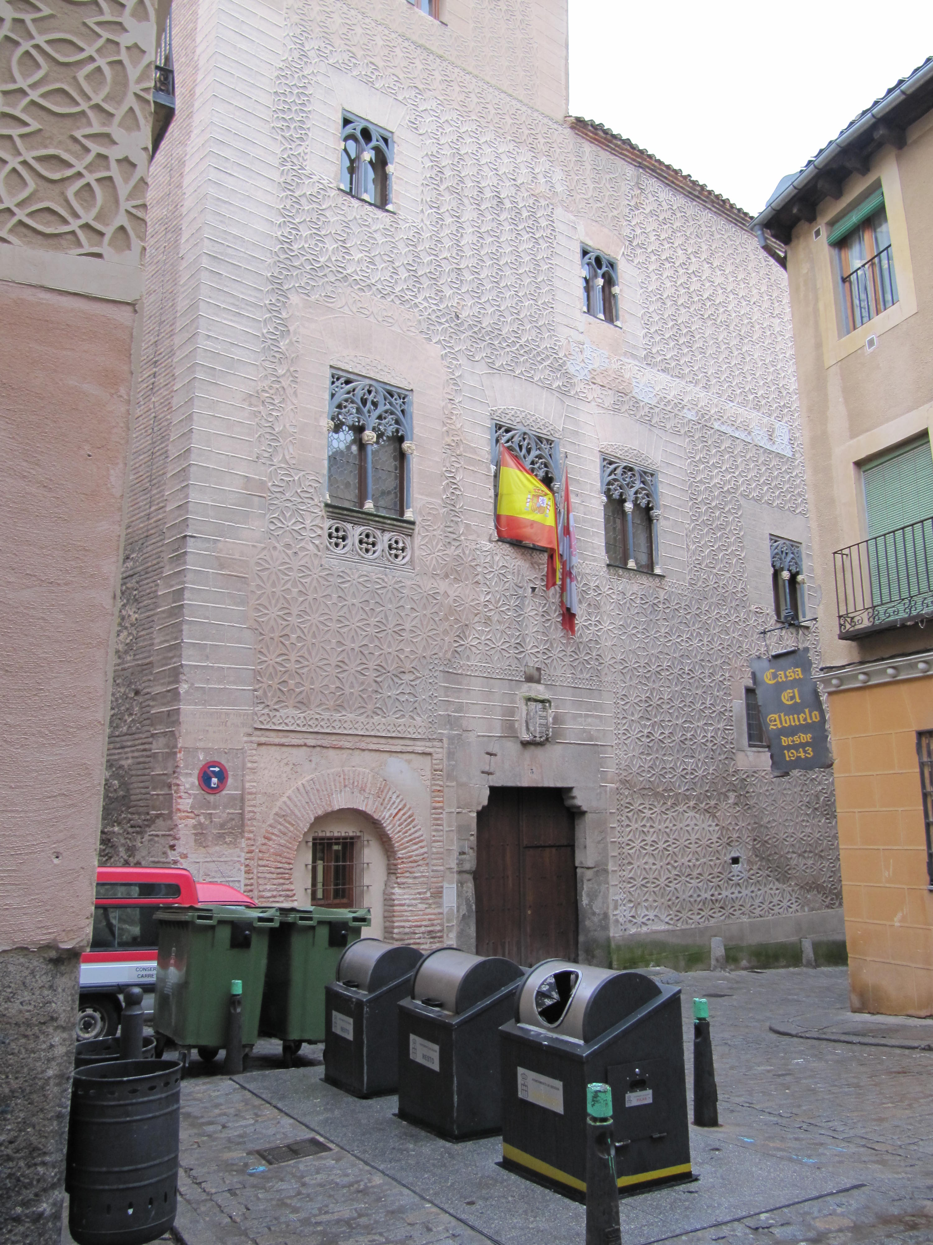 Segovia, Palacio del Conde Alpuente.